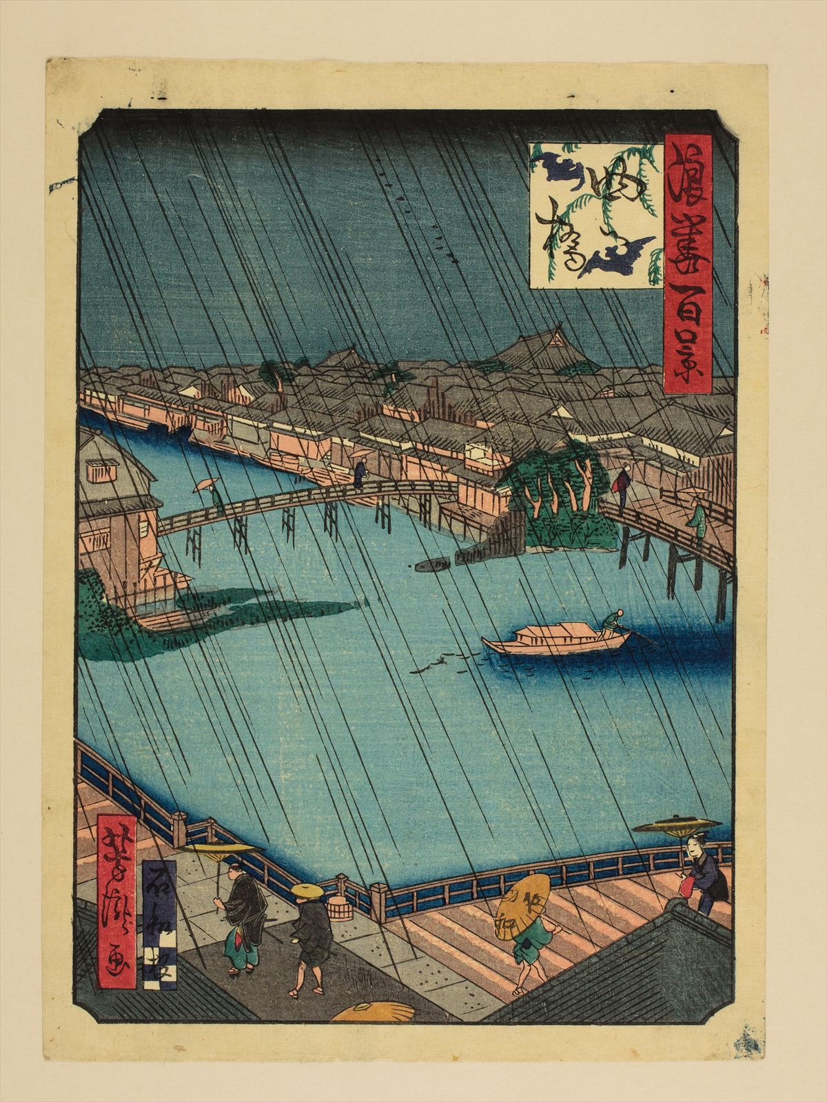 1800年代。里の家芳瀧/画。浪花百景 102枚のうちの1枚。大阪市立中央図書館蔵。